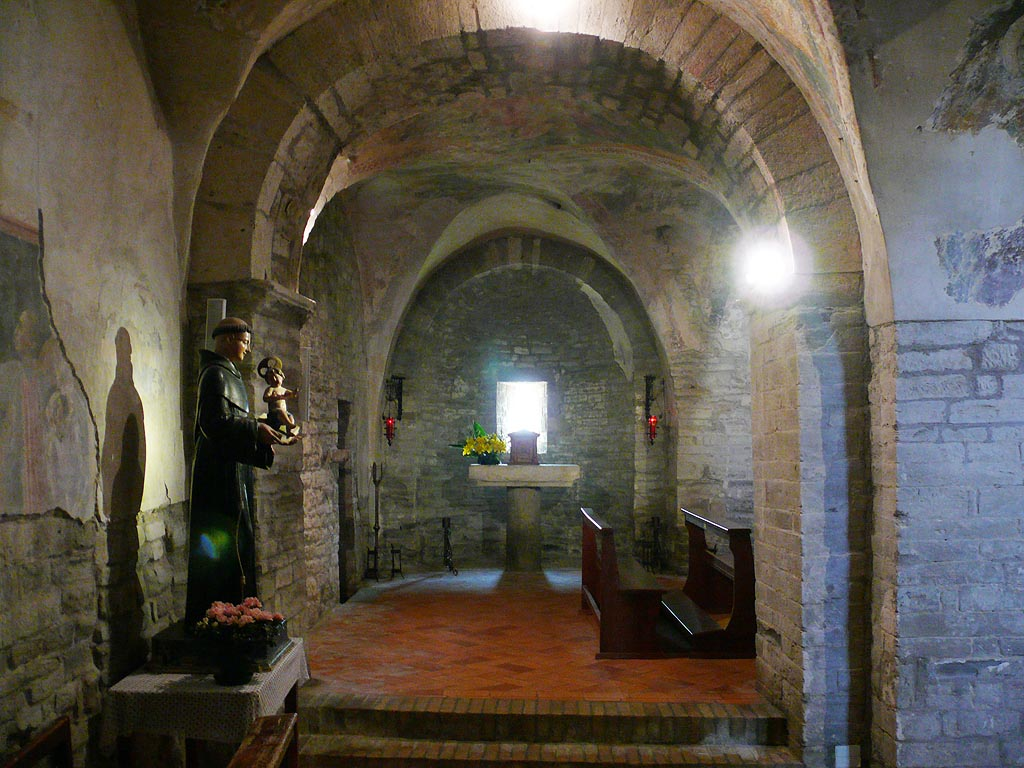 S. Michele, Seitenschiff links